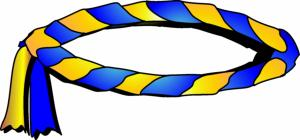 Bannerets tortillon